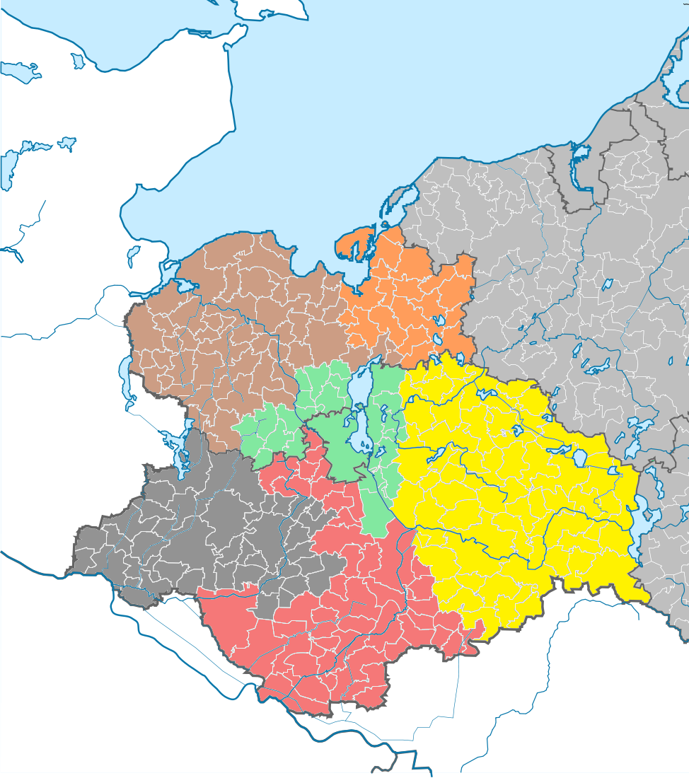 Karte der Amtsgerichtsbezirke im Landgerichtsbezirk Schwerin vor der am 6. Oktober 2014 in Kraft getretenen Gerichtsstrukturreform Amtsgericht Grevesmühlen Amtsgericht Schwerin Amtsgericht Hagenow Amtsgericht Ludwigslust Amtsgericht Wismar Amtsgericht Parchim